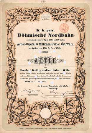 A Böhmische Nordbahn részvénye